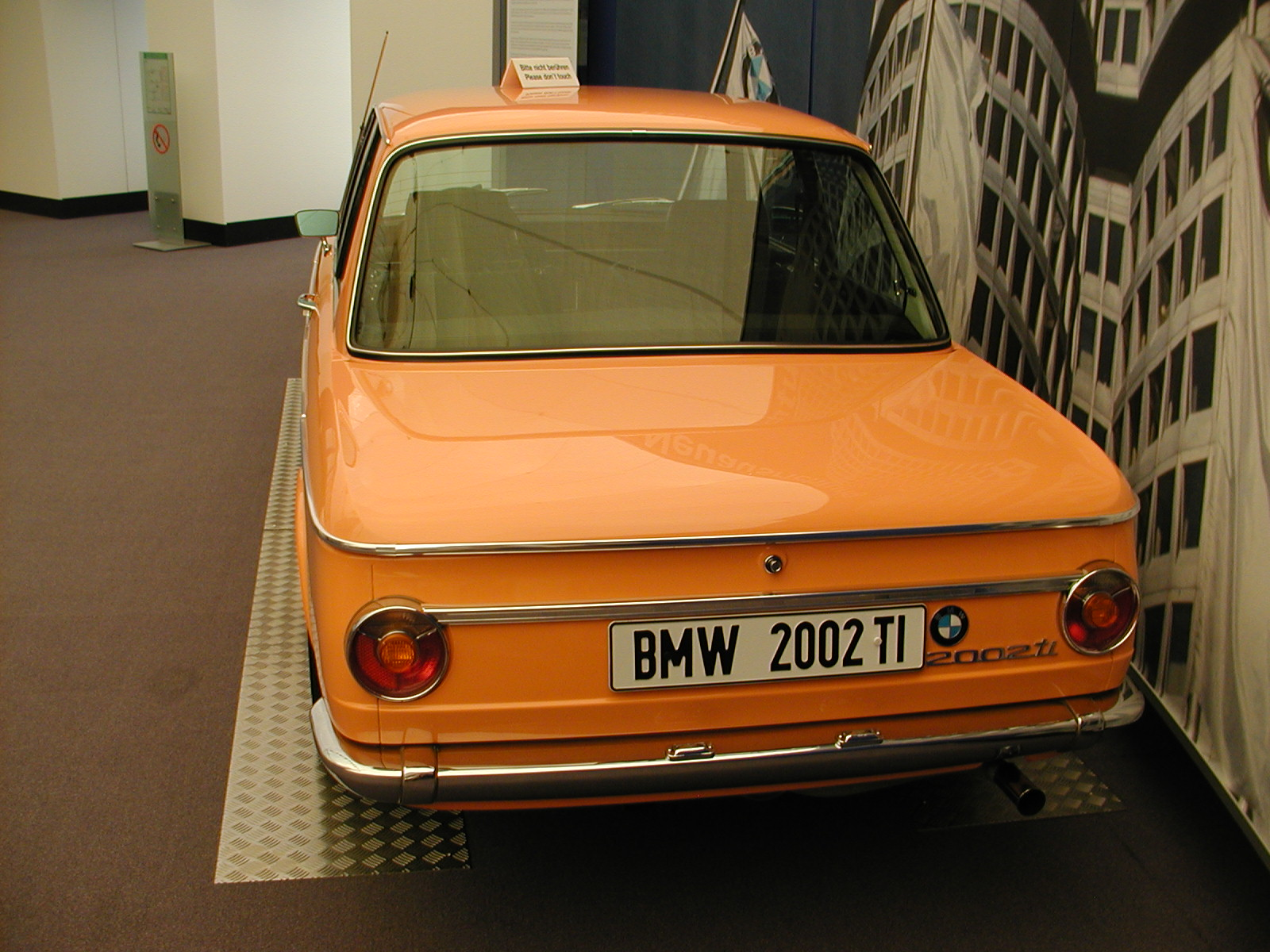 Foto der Hinterseite eines BMW 2002ti im BMW Museum München.